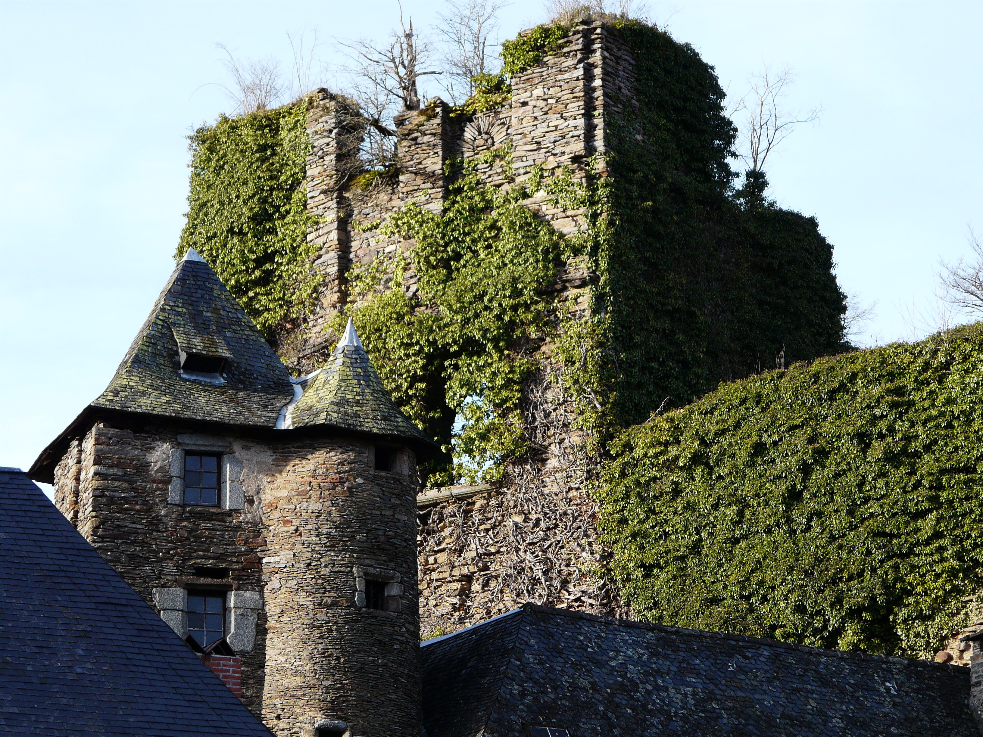 Au-dessus des toits du village, les ruines du château de Ségur, Ségur-le-Château, Corrèze, France Object location45° 25′ 47″ N, 1° 18′ 17″ E